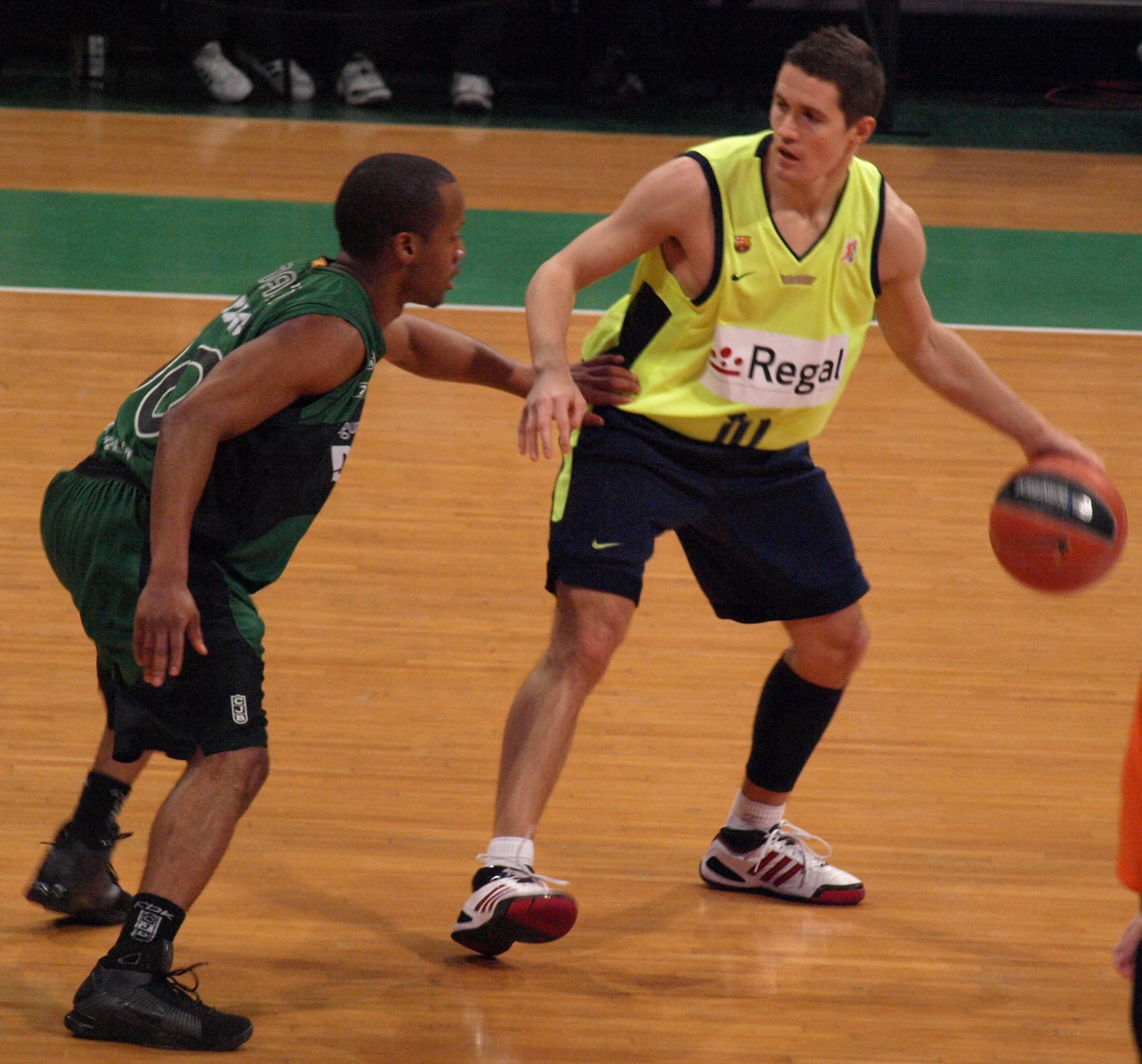 Jaka Lakovic defendido por Demond Mallet, en el partido que enfrentó al FC Barcelona y al DKV Joventut de liga ACB en el Olímpico de Badalona en enero de 2009